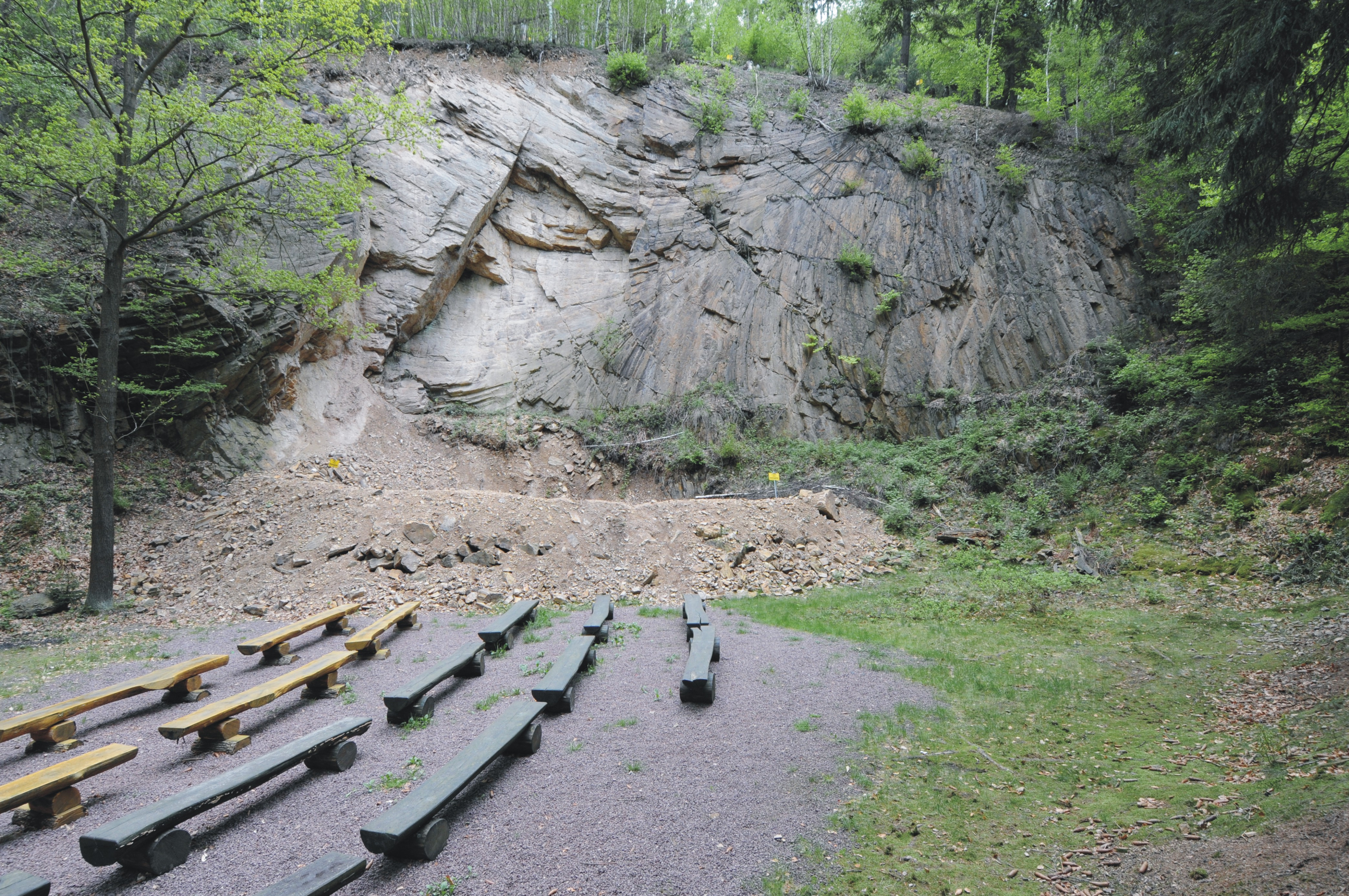 Porphyrfächer im Tharandter Wald (Ignimbrit / Schmelztuff), (Sachsen, Deutschland)